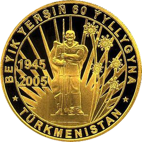 Памятная монета Туркменистана